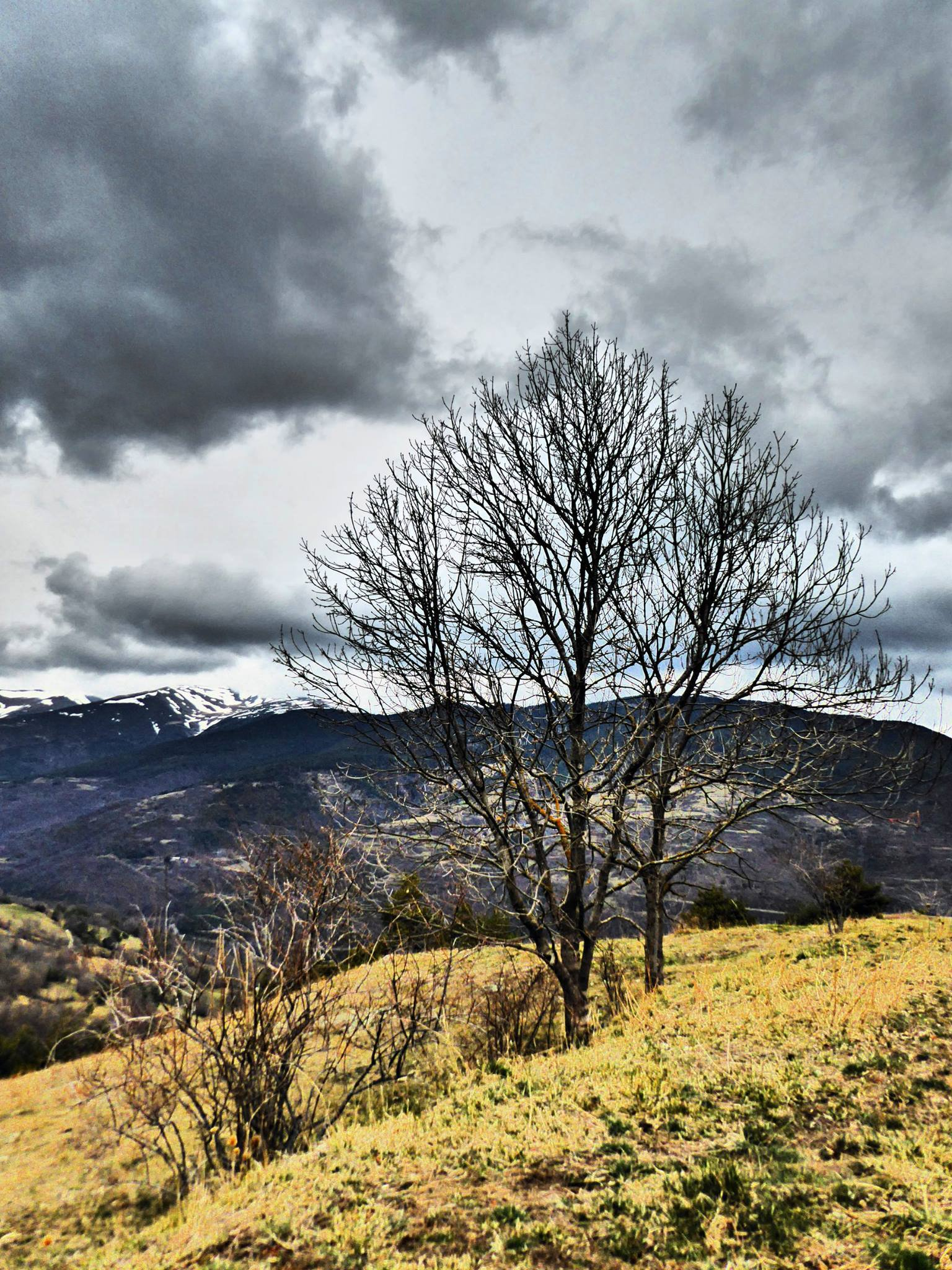 Camps de Planoles, Vall de Ribes